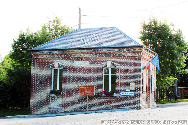 Mairie de Saint-Ouen-Le-Houx et une partie du presbitère